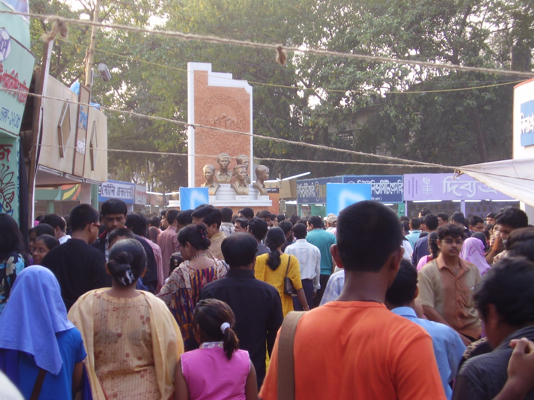 Ekushey Book Fair Dhaka Bangladesh